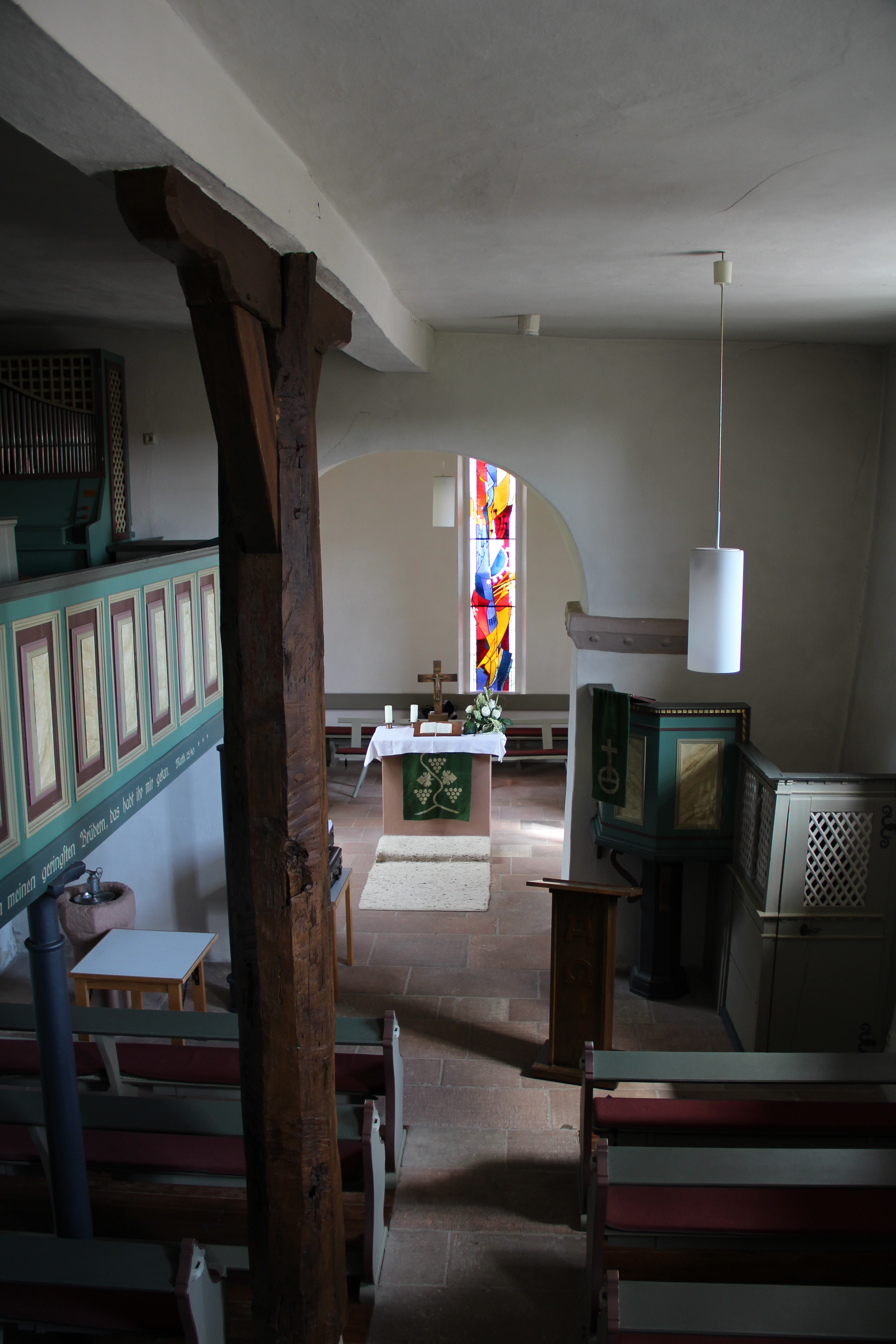 Innenraum nach Osten der Mainzlarer Kirche, Staufenberg, Kreis Gießen, Hessen, Deutschland